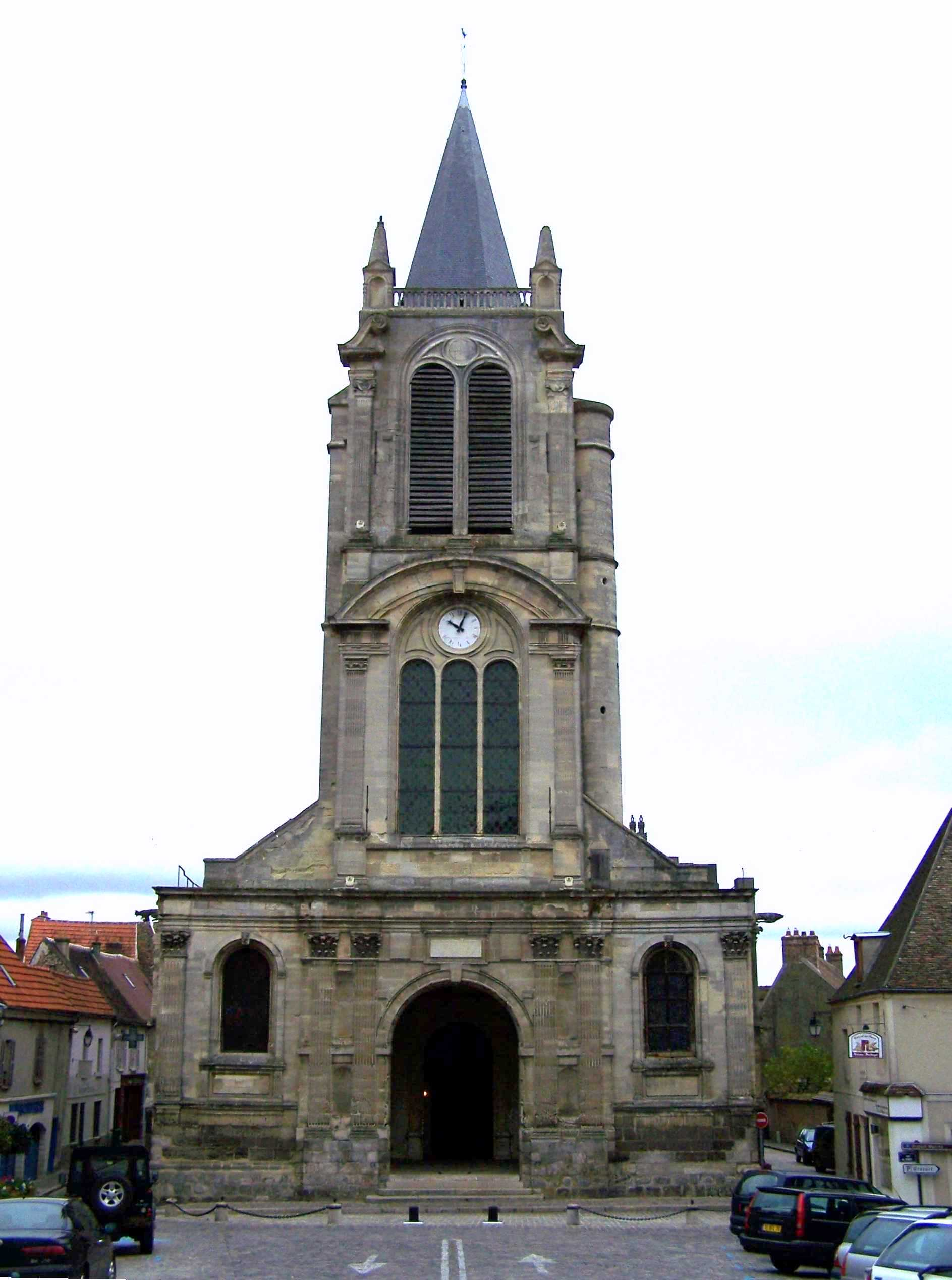 Église de Montfort-l'Amaury (Yvelines, France), des XVe et XVIe siècles.